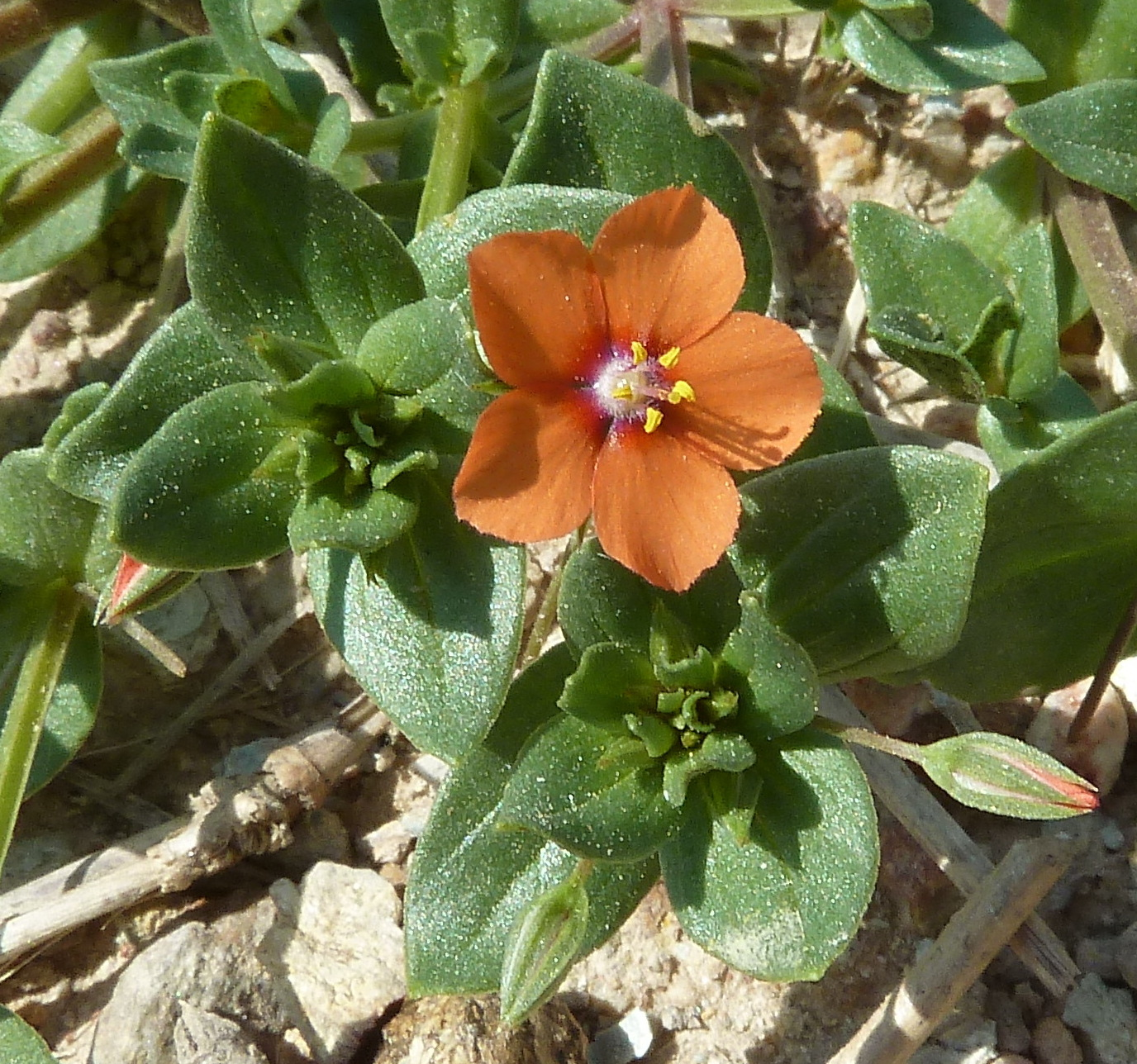 Anagallis arvensis (Pimpinella escarlata) : Flor de la forma roja - Circa Los Ojales, San Isidro de Albatera (Alicante, España).